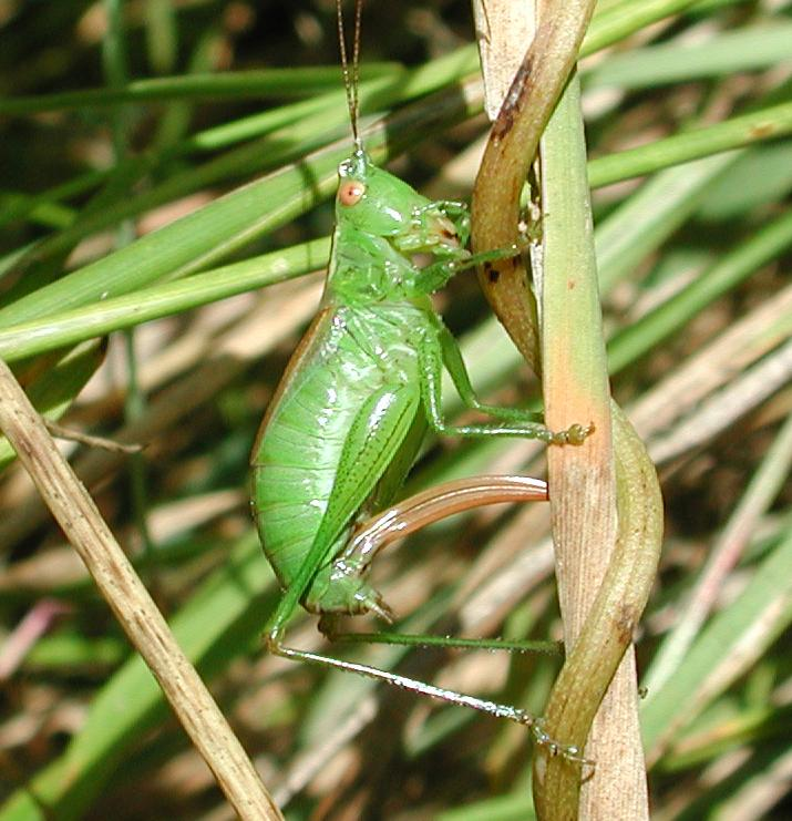 Conocephalus dorsalis, f., Kurzflügelige Schwertschrecke bei der Eiablage, NSG Kirchwerder Wiesen, Elbmarsch bei Hamburg, Deutschland